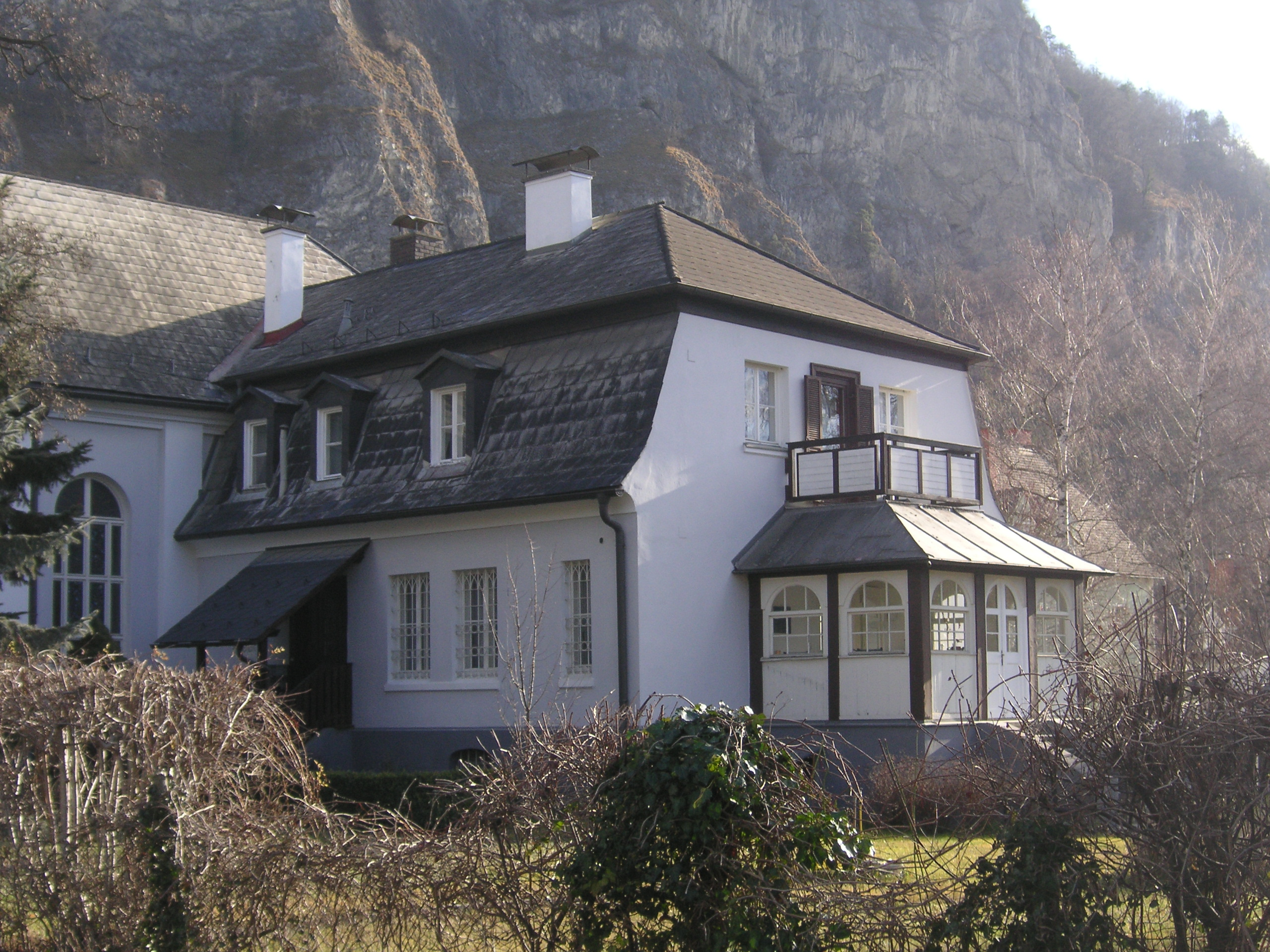 Evang. Pfarrkirche A.B., Friedenskirche mit Pfarrhaus